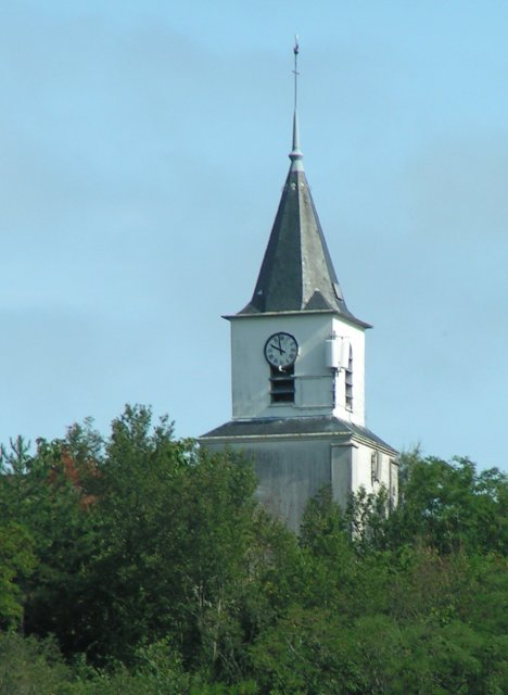 Description: Église de Châteaufort. Source: photo prise par Christophe Jacquet en le 20 juillet 2004. © Christophe Jacquet, 2004. Licence: Chateaufort Catégorie:Image de Châteaufort